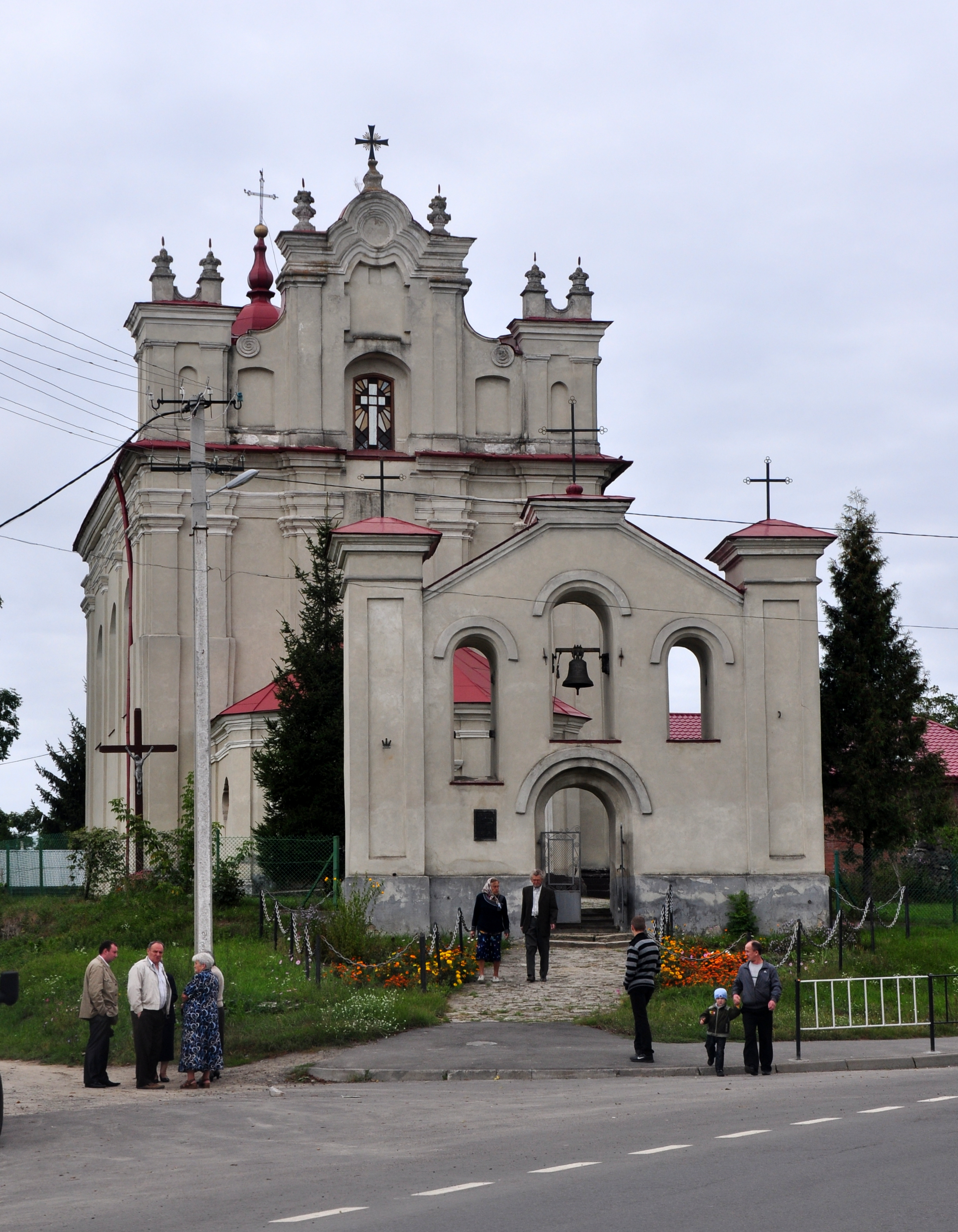 Костел Пресв.Трійці в Янові (Івана Франка) Яворівського р-ну Львівської обл.